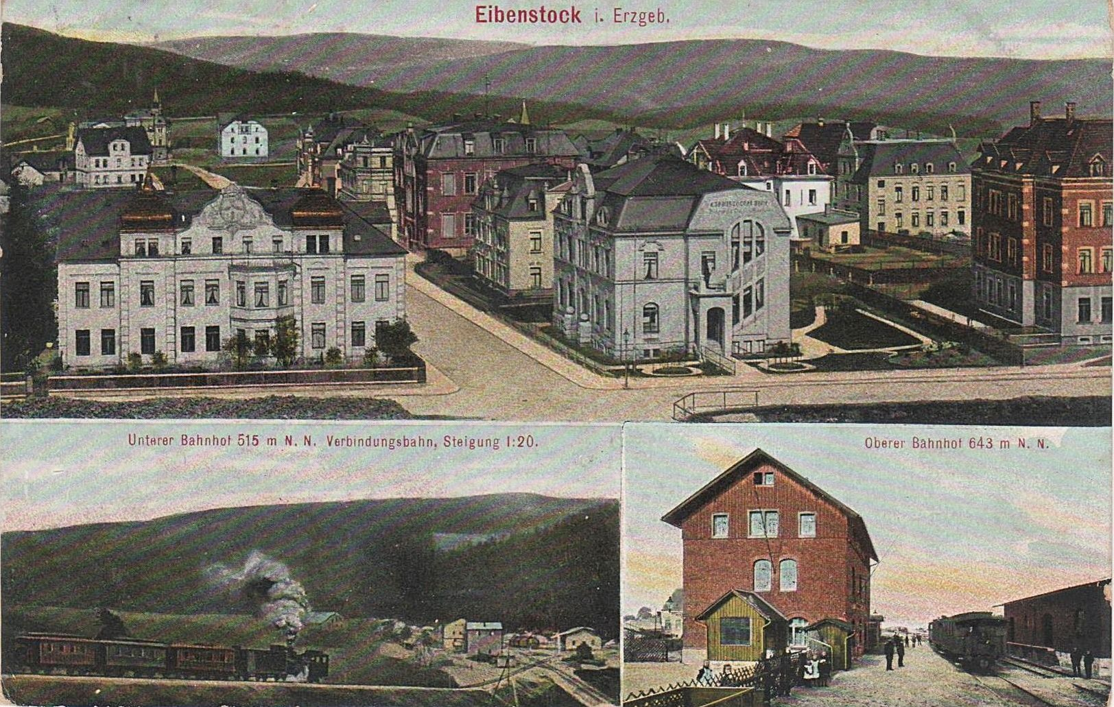 Eibenstock in einer Ansichtskarte von um 1905 mit dem „Oberen Bahnhof“ und dem Unteren Bahnhof.